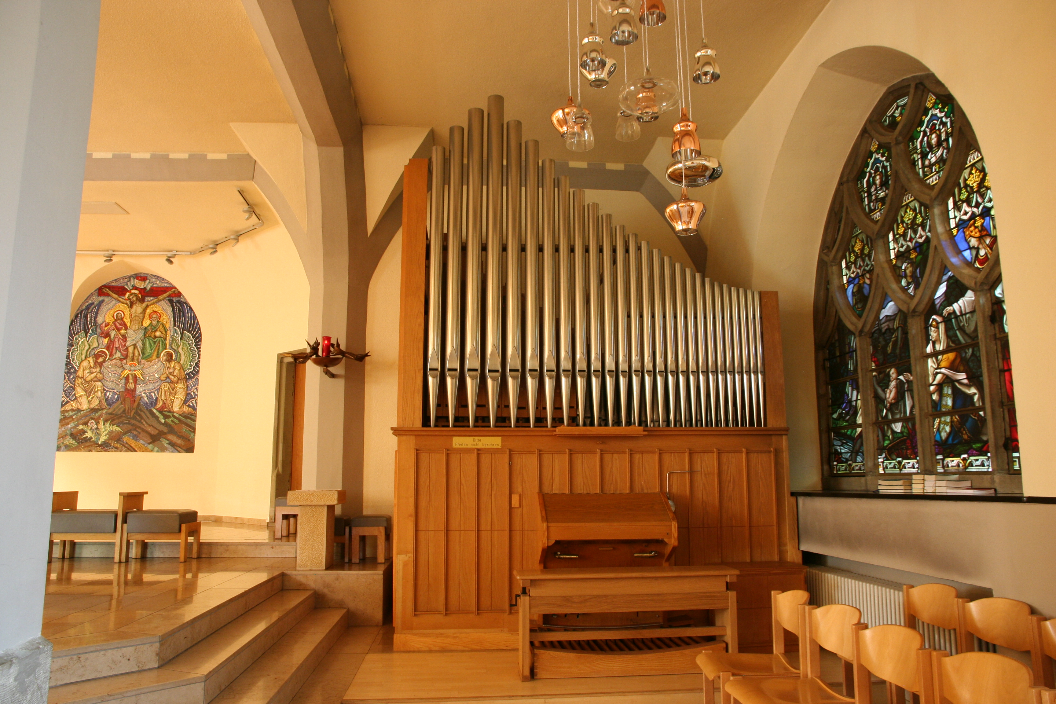 Römisch-katholische Pfarrkirche St. Maria Biel/Bienne, Metzler-Orgel von 1953 in der Krypta